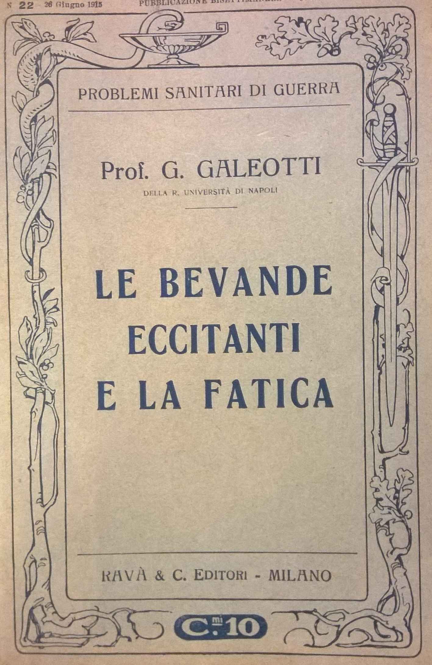 22° fascicolo di una serie intitolata Problemi Sanitari di Guerra, a cura del senatore e medico Alessandro Lustig